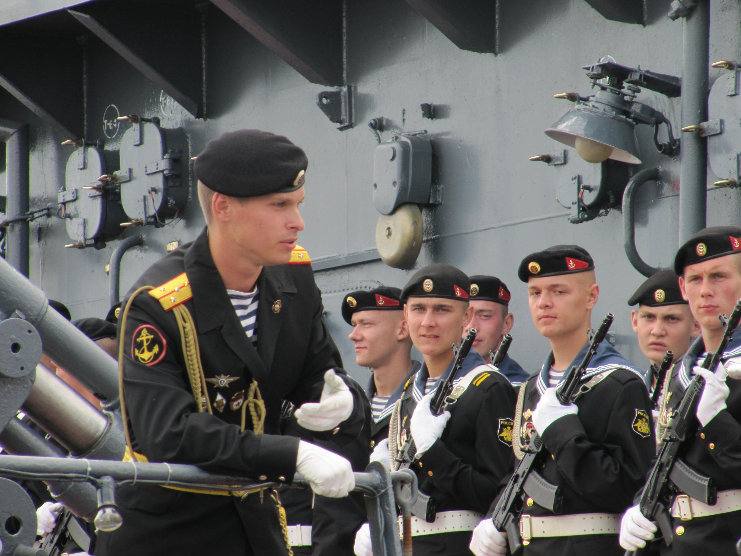 La Russie invité d'honneur Brest 2012 Equipage du Kaliningrad